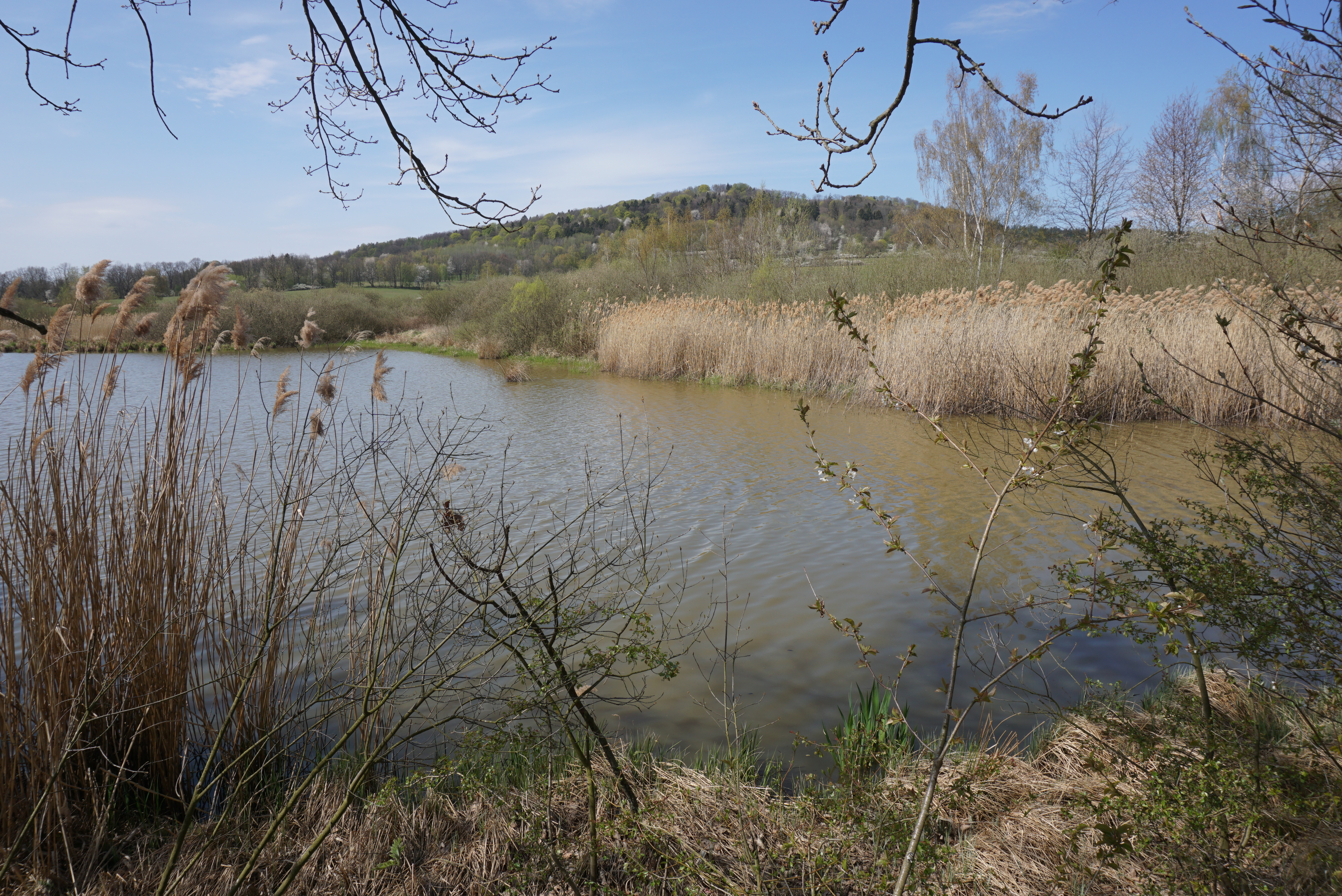 PP Stružnické rybníky (duben 2020)